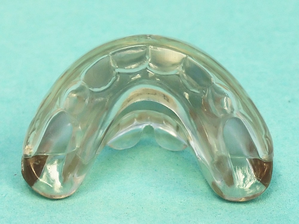 Own work